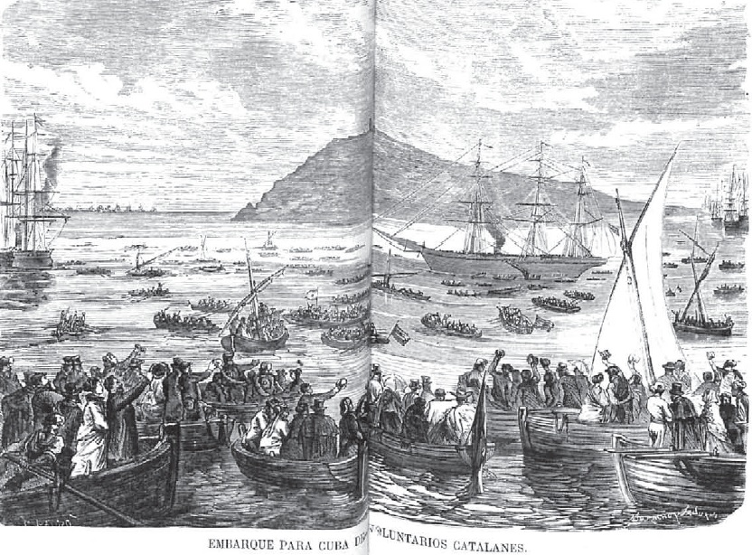 Embarque voluntarios catalanes a cuba en 1869. Guerra de los Diez Años. La guerra comenzó con el Grito de Yara, en la noche del 9 al 10 de octubre de 1868, en la finca La Demajagua, en Manzanillo que pertenecía a Carlos Manuel de Céspedes. Terminó diez años más tarde con la Paz de Zanjón o Pacto de Zanjón, donde se establece la capitulación del Ejército Independentista Cubano frente a las tropas españolas. Este acuerdo no garantizaba ninguno de los dos objetivos fundamentales de dicha guerra: la independencia de Cuba y la abolición de la esclavitud.